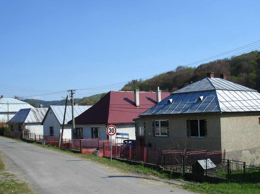 Palota